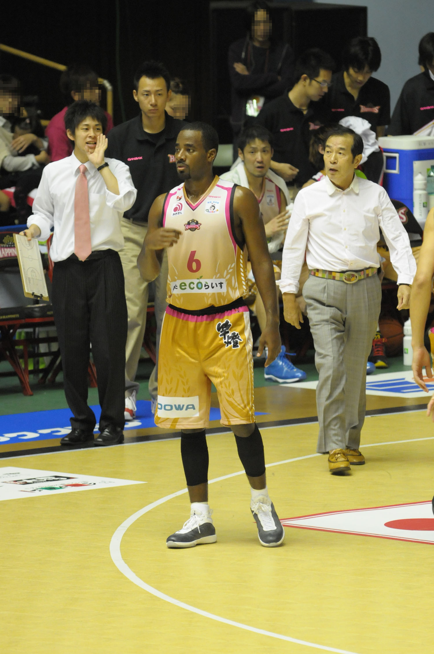 秋田ノーザンハピネッツ、ケニー・テイラー選手。秋田県立体育館で。